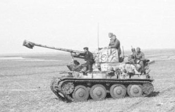 Krim, Anfang Mai 1942 Aufmarsch zum Angriff auf die Halbinsel Kertsch